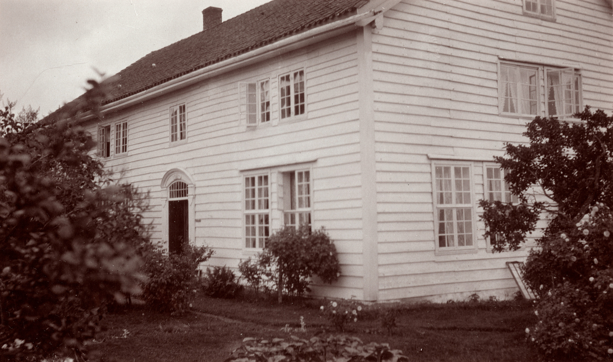 Gloppen prestegård, Vereide. Ukjent fotograf, fra Riksantikvarens Kulturminnebilder.